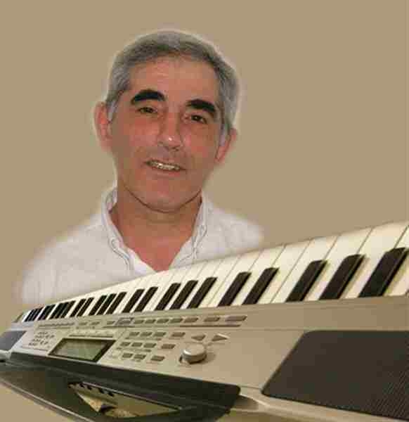 Зильбер, Григорий Самуилович фотография с компакт диска